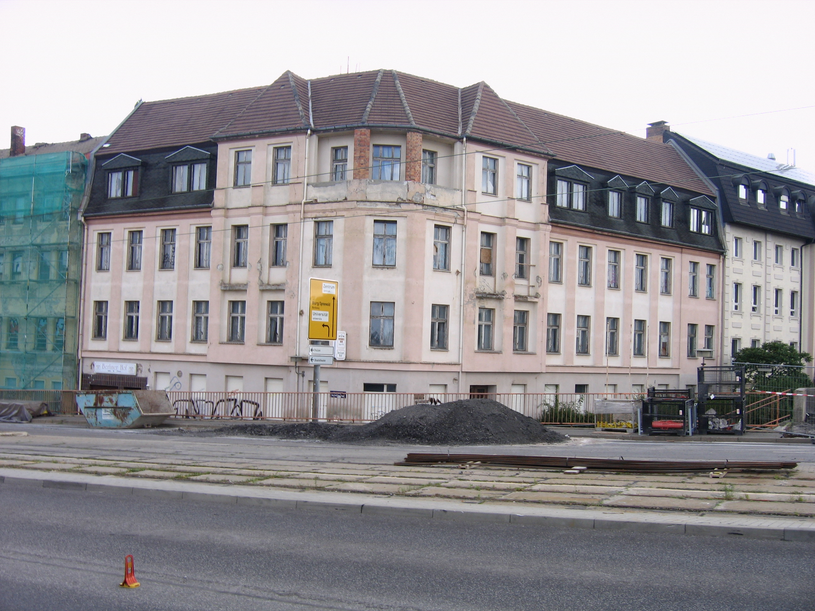 Ehemaliges Hotel "Berliner Hof", Bahnhofstraße 38 in Cottbus.